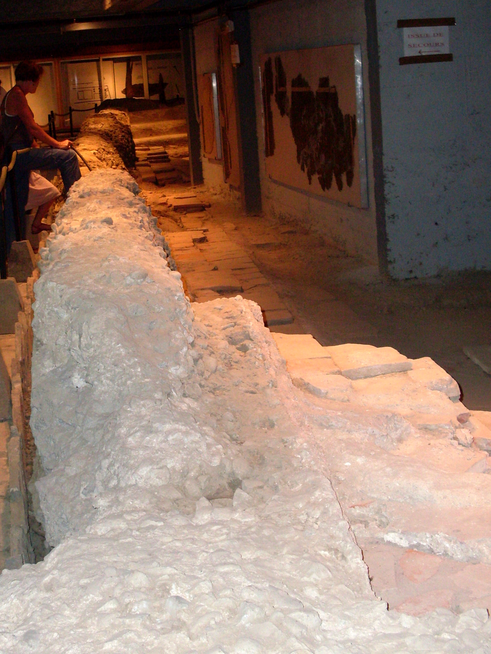 Vestiges de la piscine des thermes romaines de l’actuel Toulouse Ancely, conservés sous un immeuble du quartier.